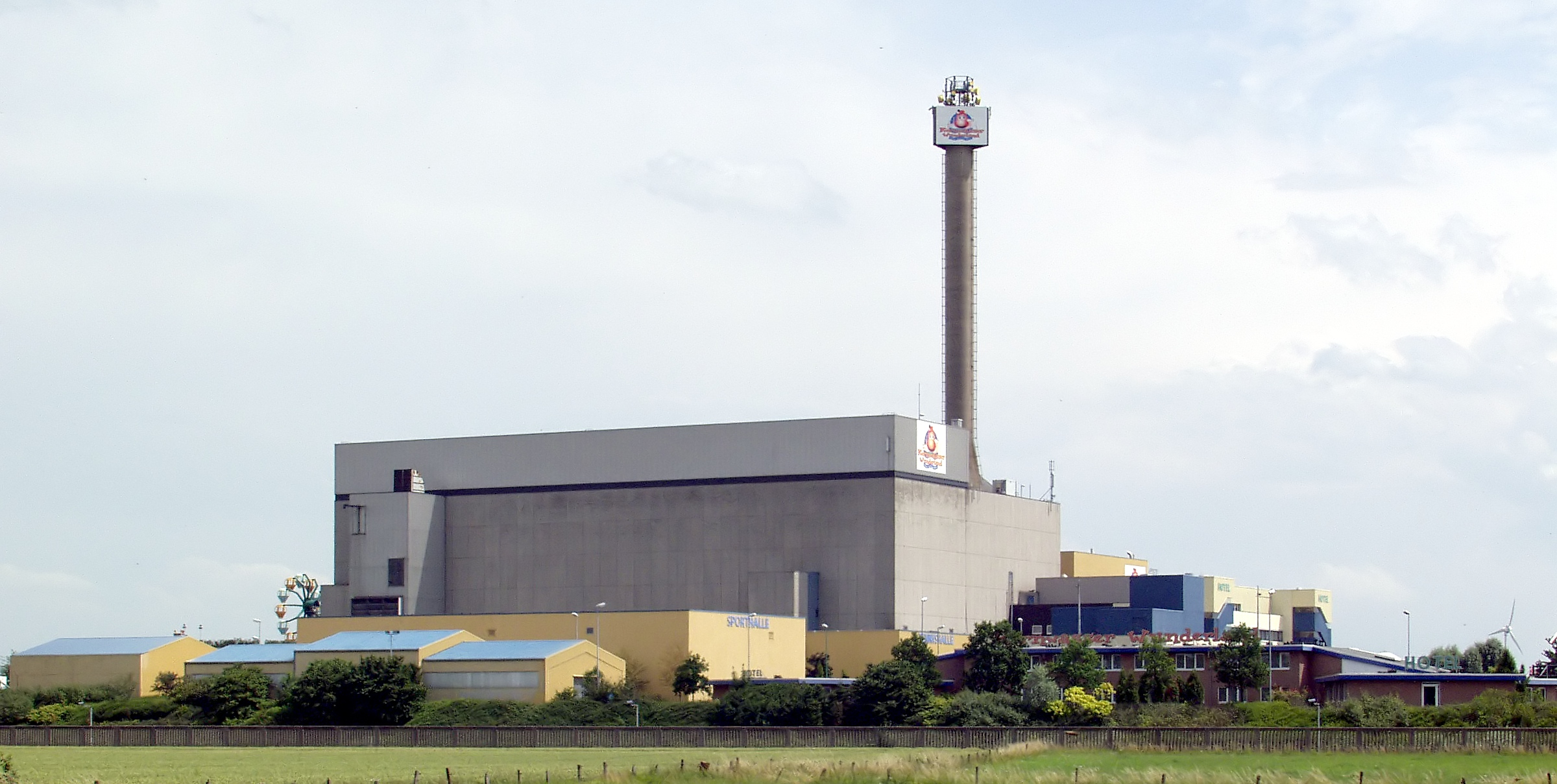 Kernwasser-Wunderland, ehemals Schneller Brüter Kalkar.